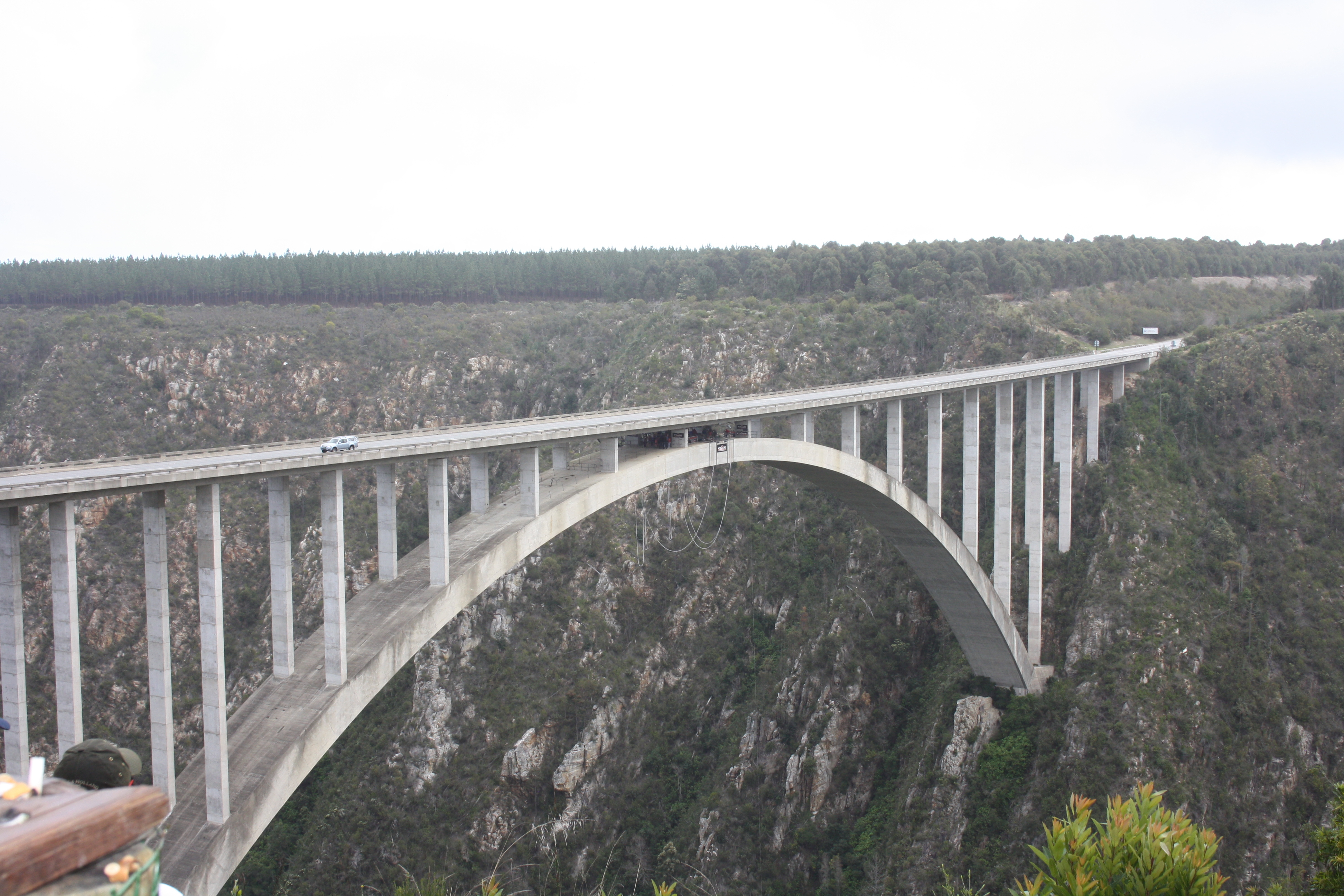 Pont suspendu sur la Route des Jardins